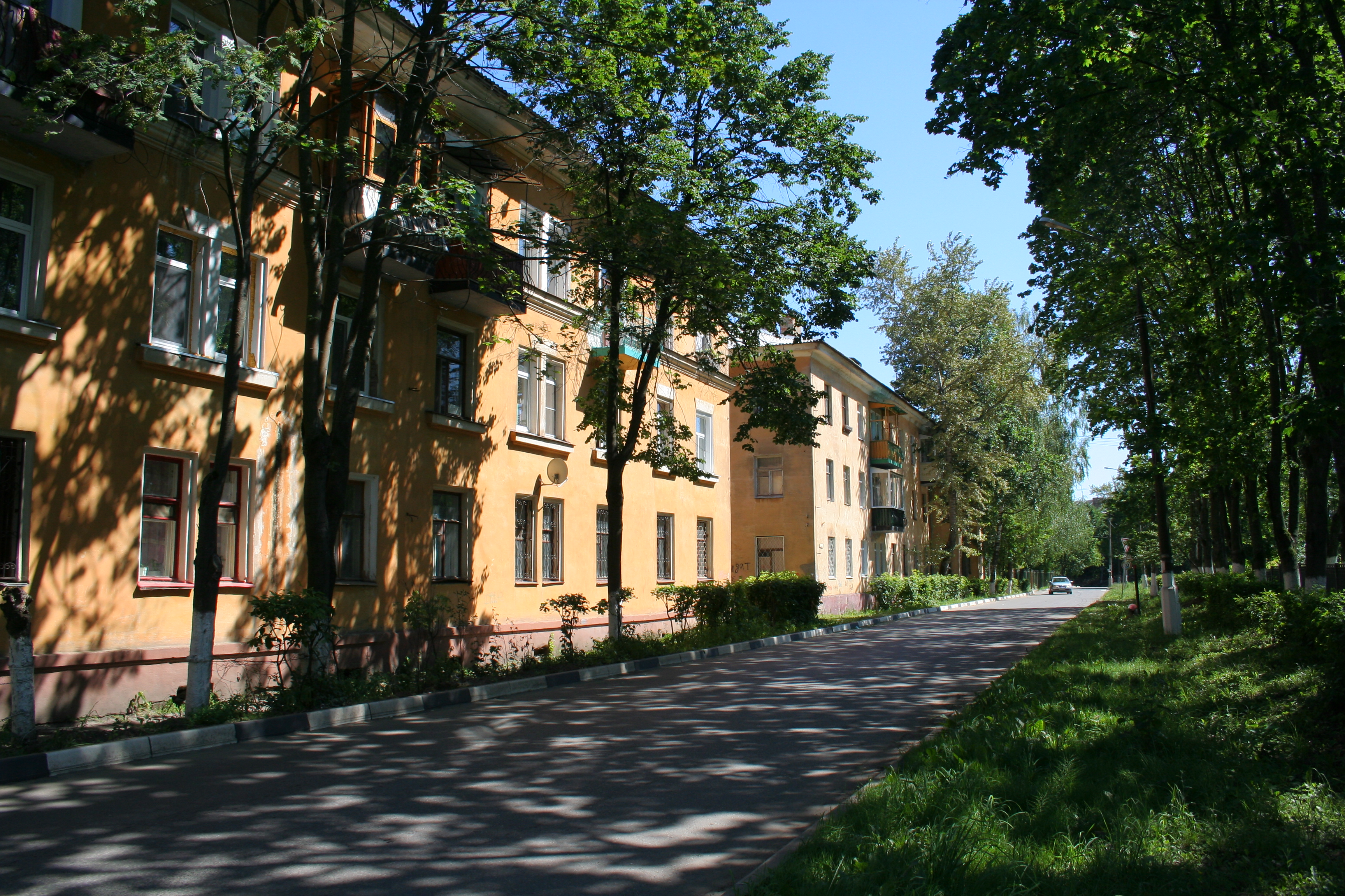 Wohnhäuser in der Siedlung Lwowski, Oblast Moskau, Russland.